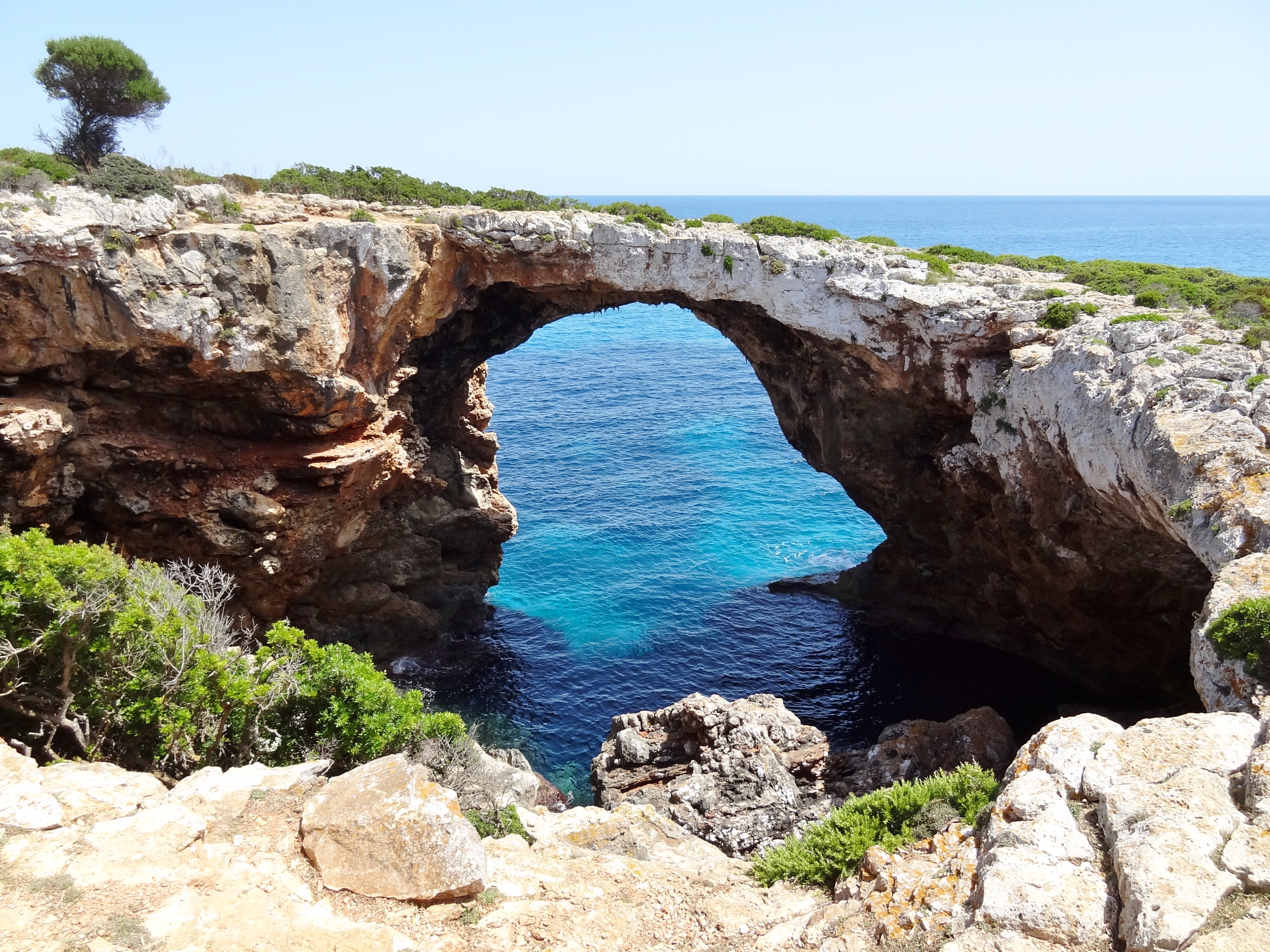 Die Cova Marina des Pont, auch Cova des Pont de sa Marina oder Cova esfondrada des Pont neben der Cala Varques in der Gemeinde Manacor, Mallorca, Spanien